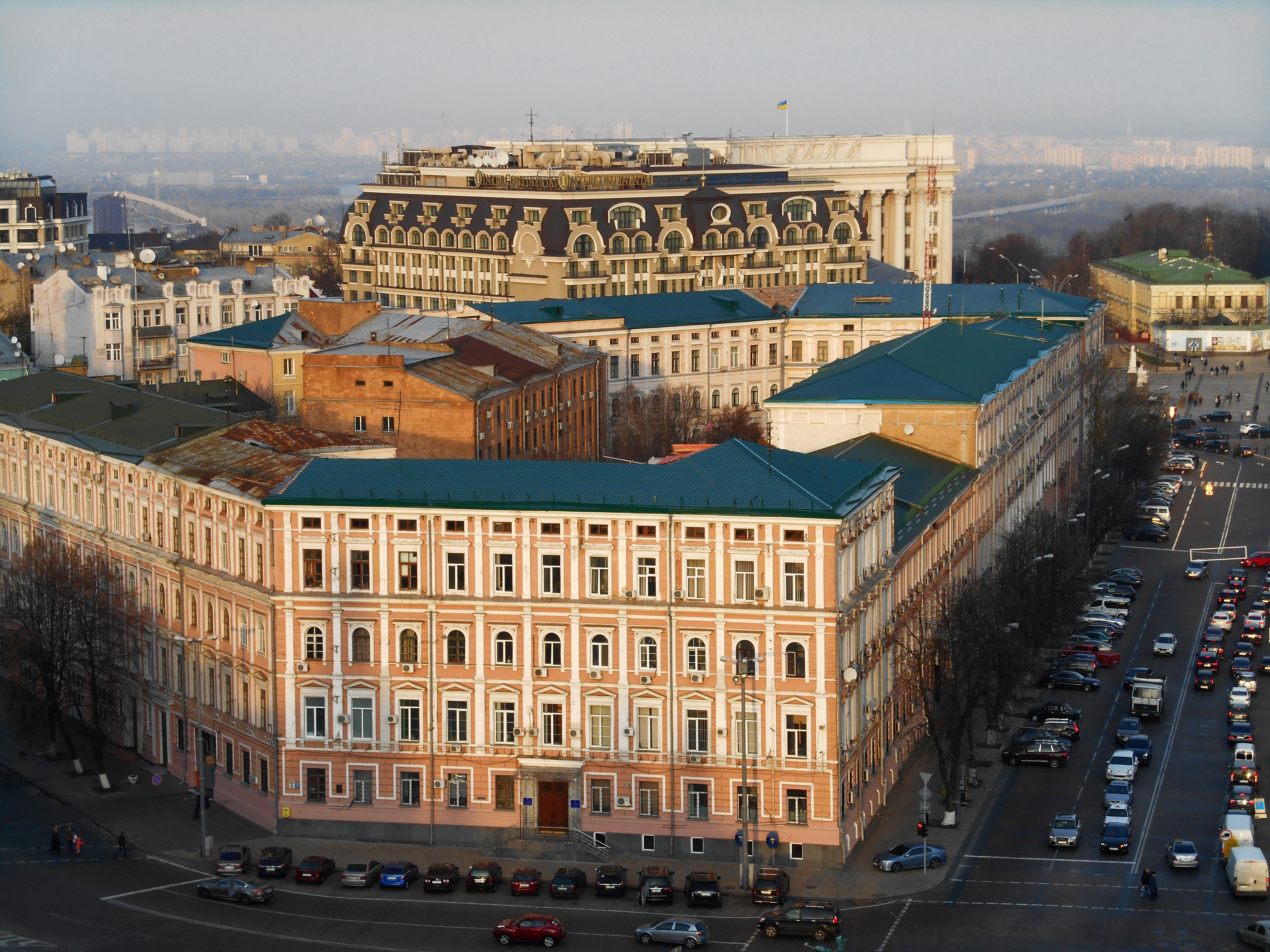 Будинок Присутствених місць з будинком міської поліції, Київ, Велика Житомирська вул., 1-3/15